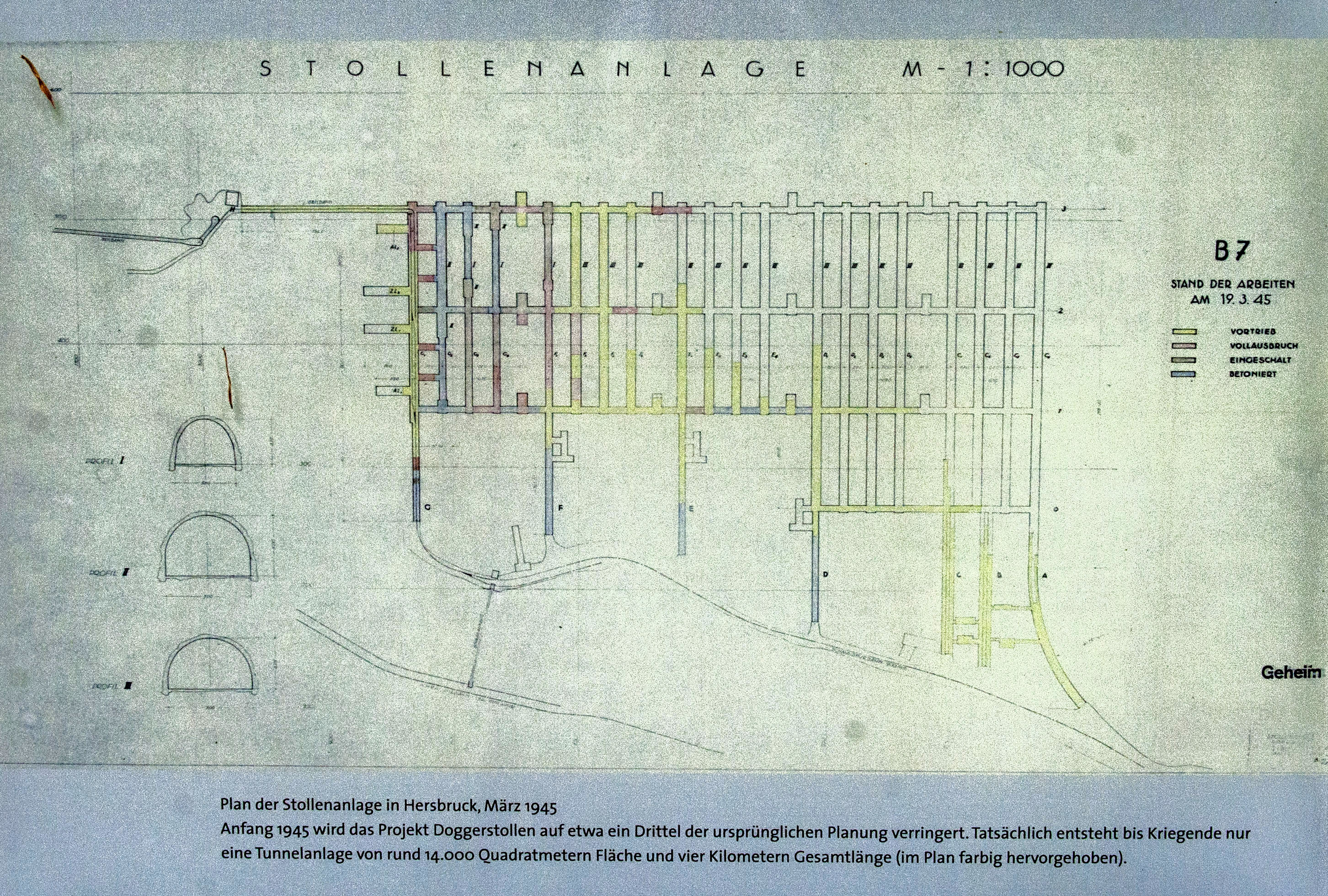 Houbirg, Happurg, Landschaftsschutzgebiet Südlicher Jura mit Moritzberg und Umgebung, Doggerwerk